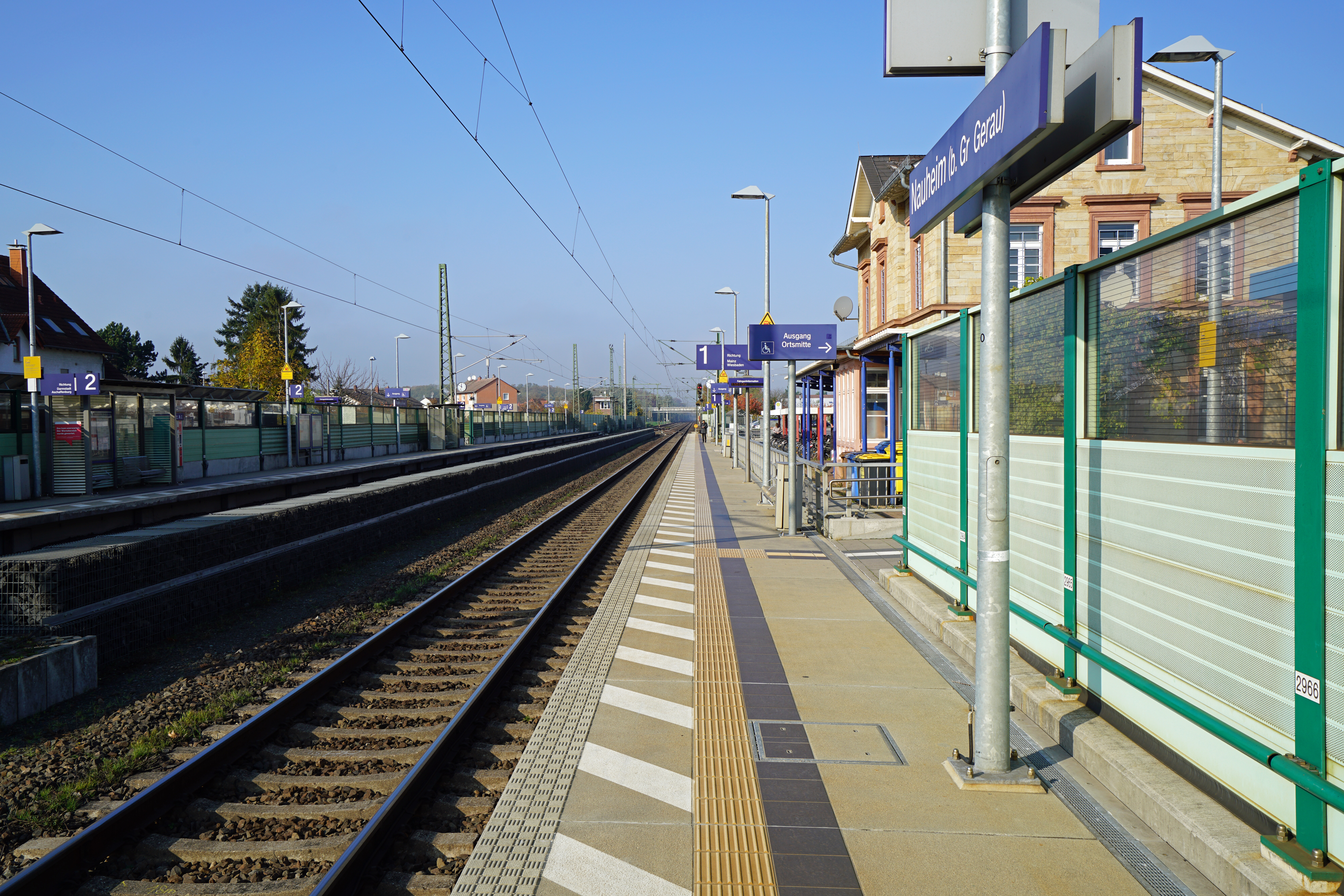 Bahnsteige des Bahnhofs Nauheim (b Groß-Gerau) in Nauheim in Hessen